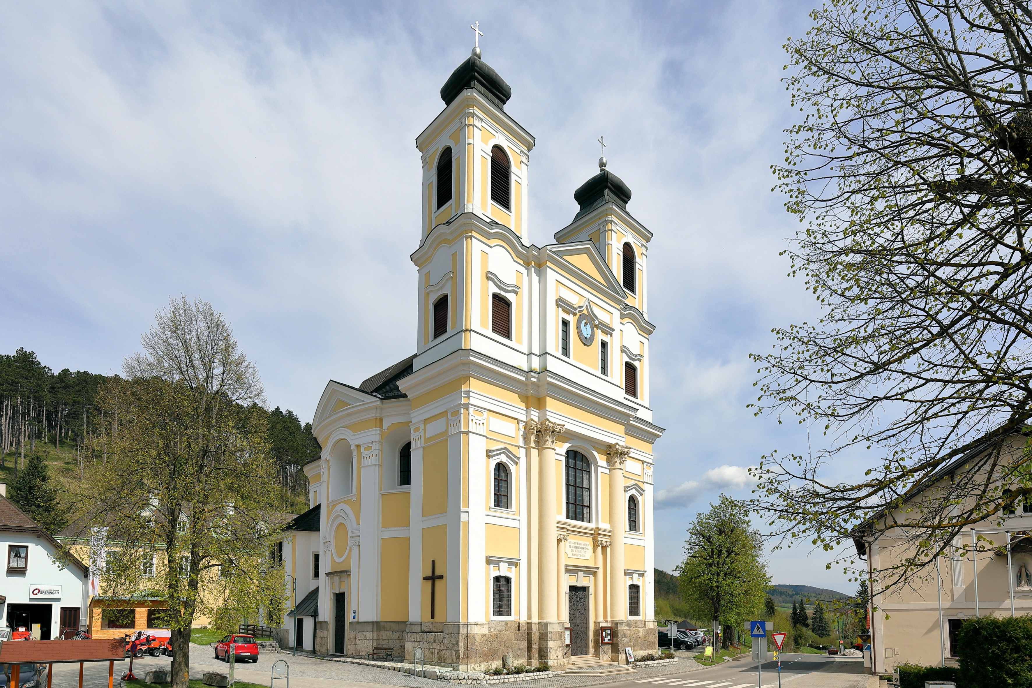 Die Pfarr- und Wallfahrtskirche Unsere liebe Frau am Hafnerberg in der niederösterreichischen Marktgemeinde Altenmarkt an der Triesting. Der barocke Zentralbau wurde an Stelle einer Kapelle nach Plänen von Daniel Dietrich von 1729 bis 1740 errichtet.